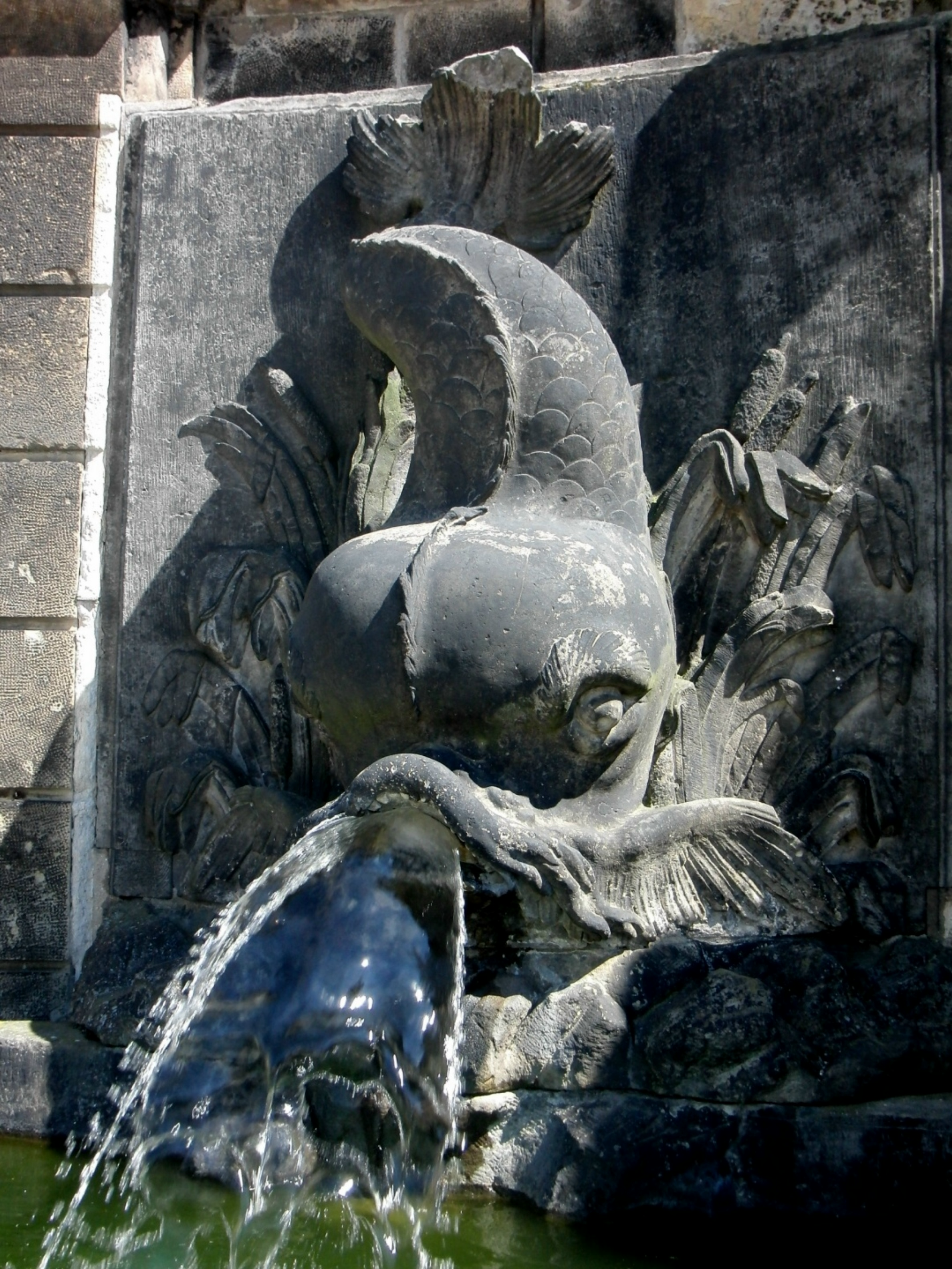 Delphinbrunnen im Barockgarten GroßsedlitzJohann vom Dresdner Bildhauer Christian Feige der Jüngere um 1781